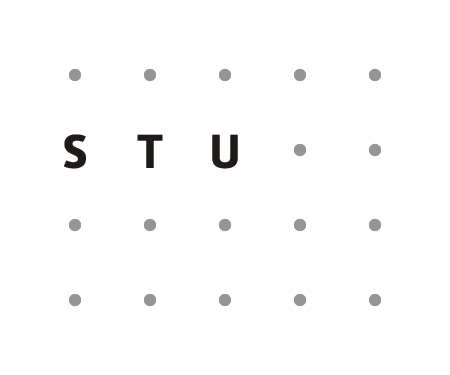 logo